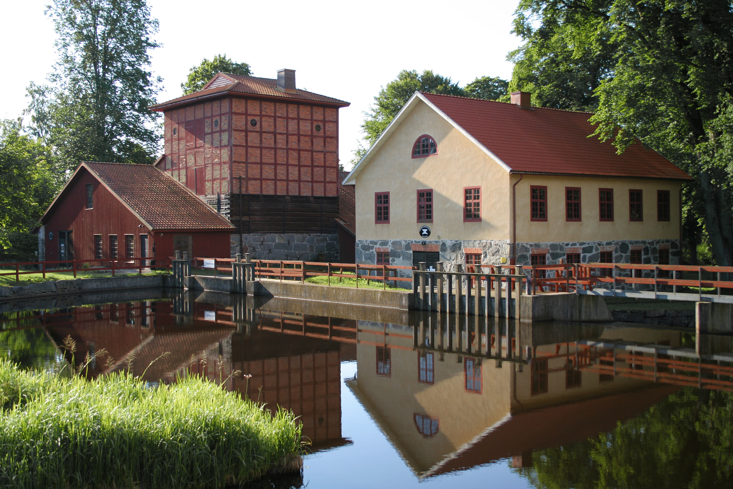 Mekaniska verkstaden, Masugnen och gjuteriet med Helge å i förgrunden.